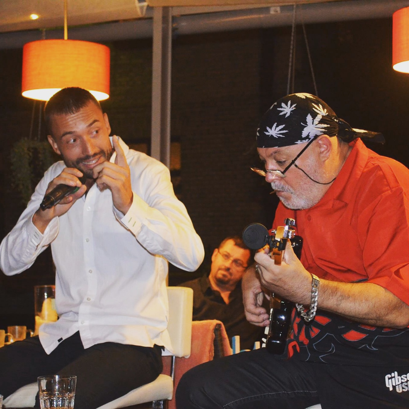 Слава Варда и Александр Сульдин на концерте